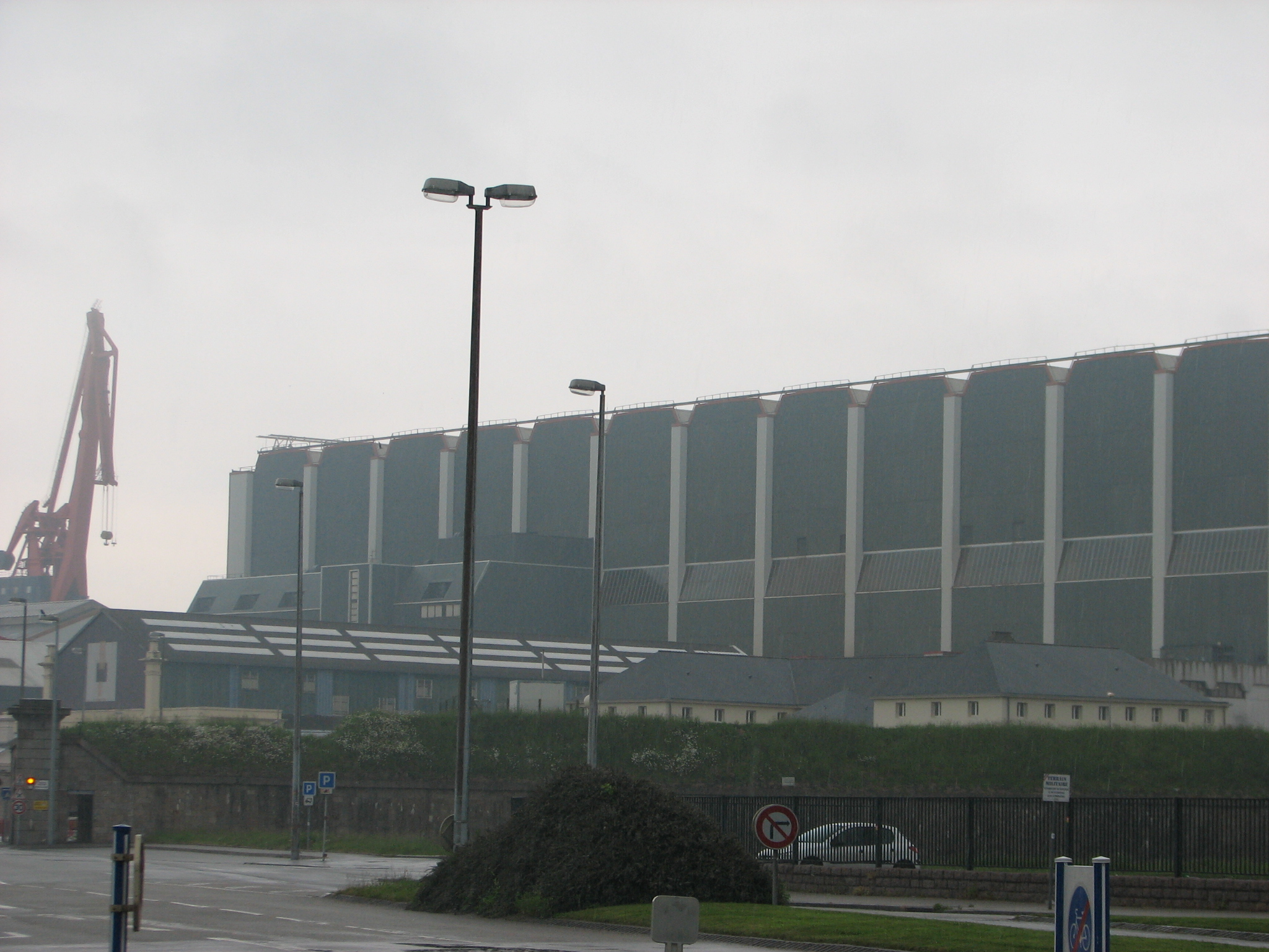 DCNS dans l'enceinte de l'Arsenal